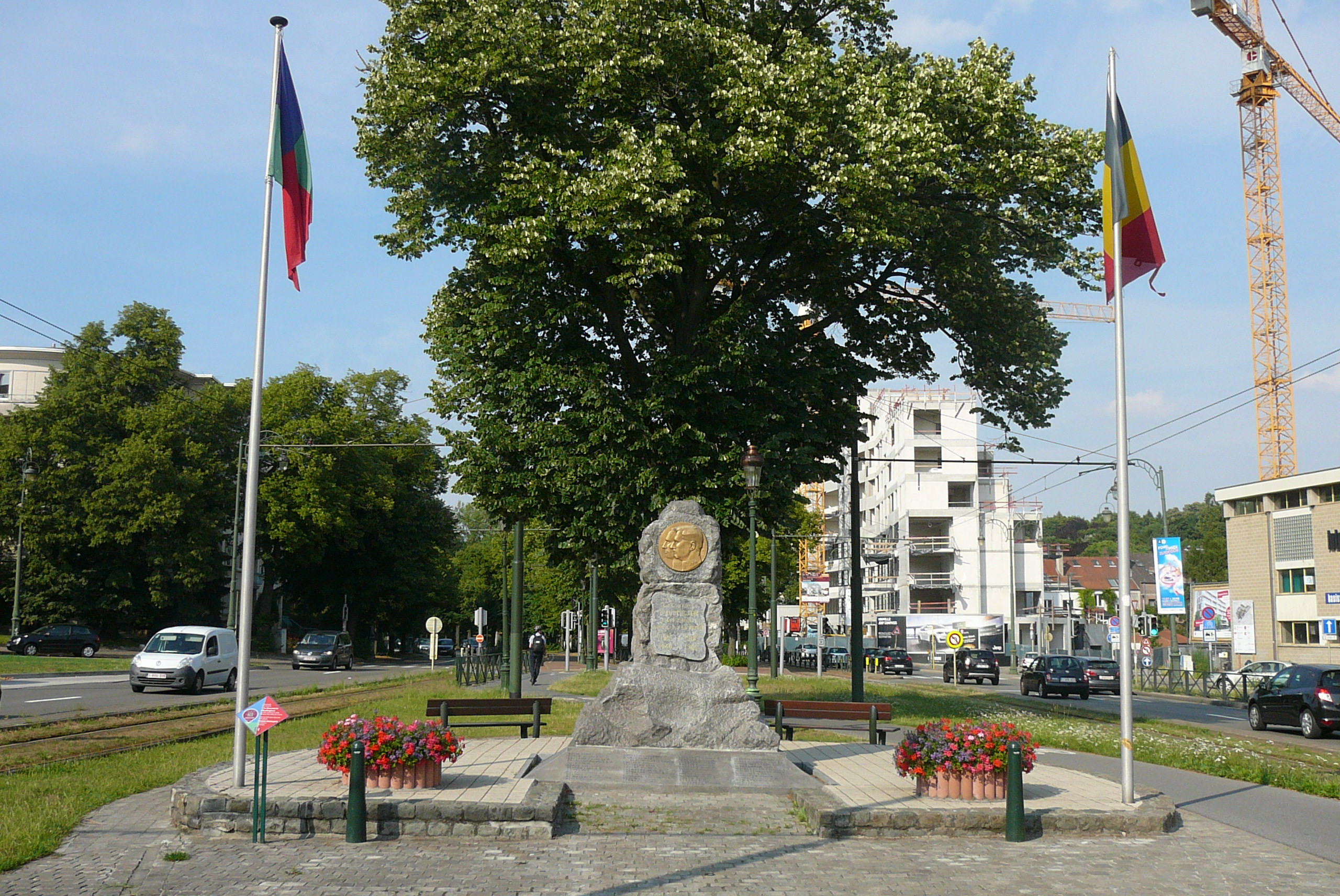 Mémorial du Rond-Point du Souverain, à Auderghem, commémorant les victimes des deux guerres mondiales.